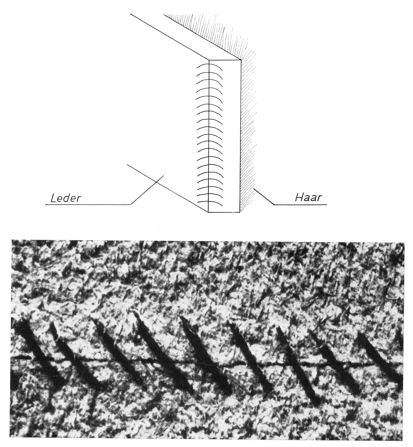 Nähte in der Kürschnerei: Absatz „Nähtechnik, Ledernähte, Stoßnaht“.